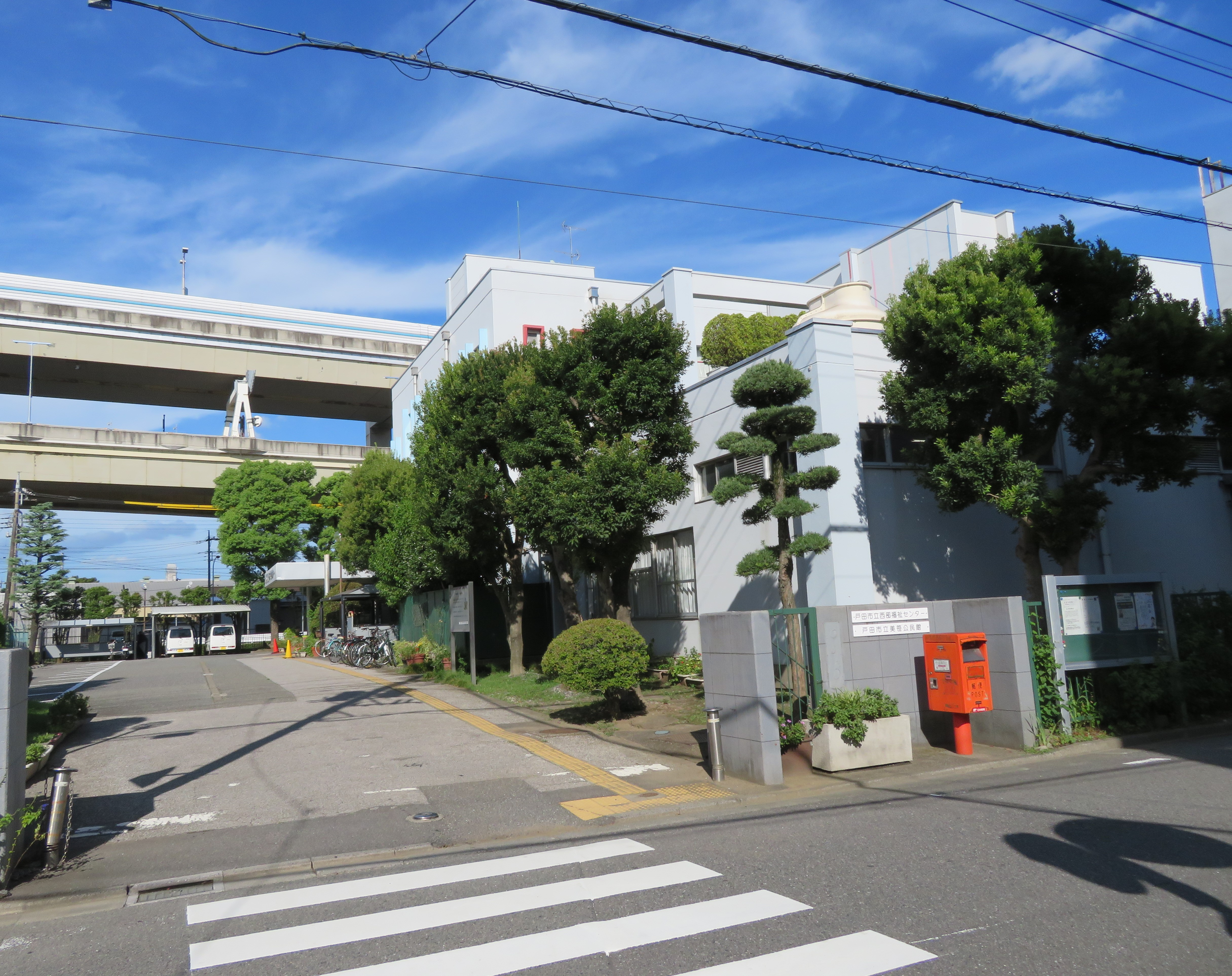 戸田市立西部福祉センター Canon PowerShot SX720 HS